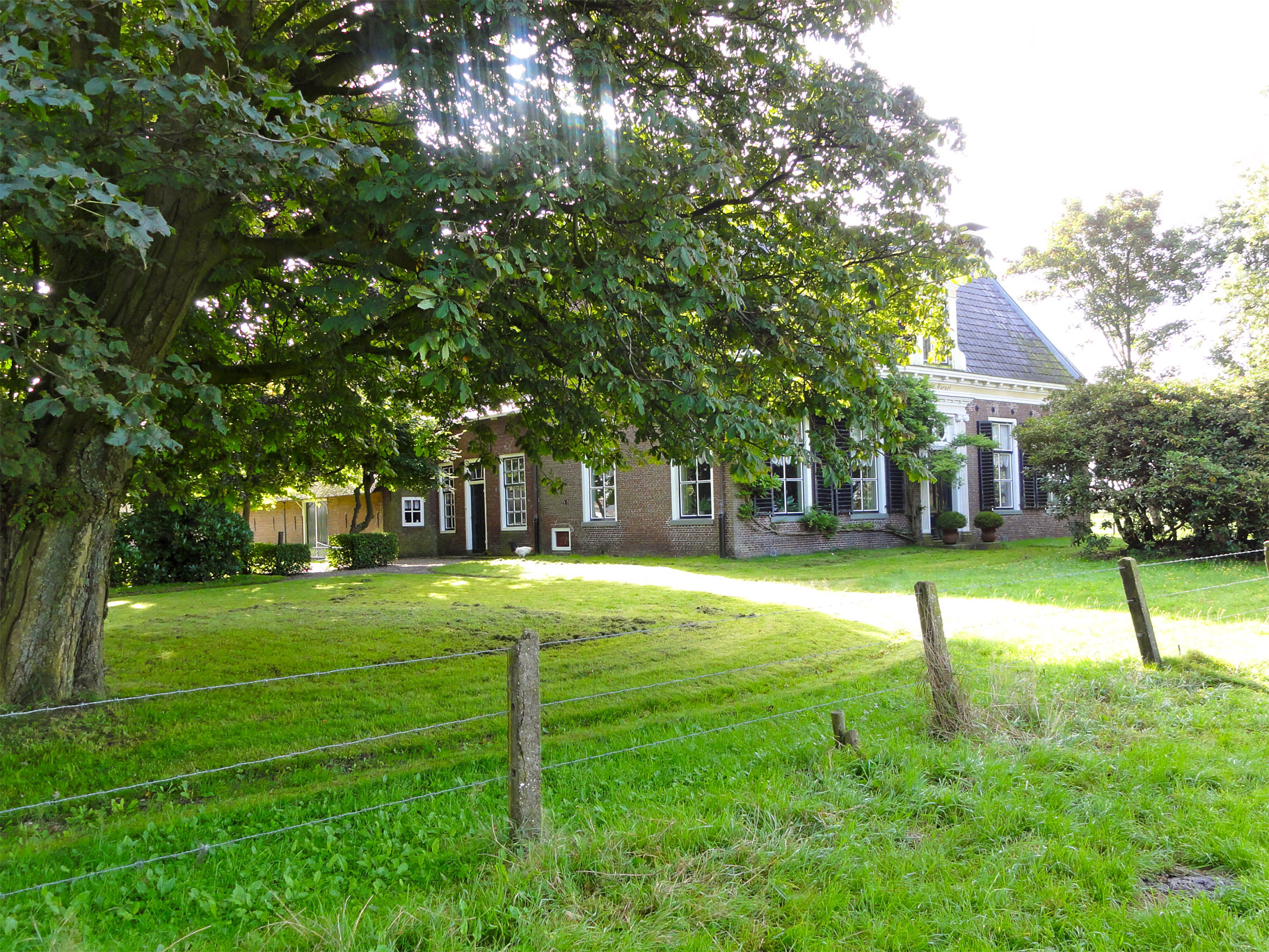 Zwarteweg 2 Eastermar